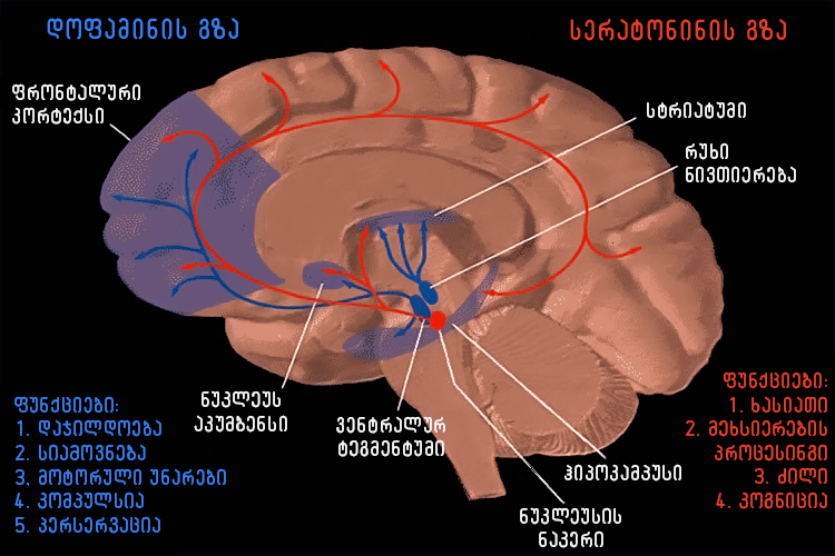 დოფამინისა და სეროტონინის გზები